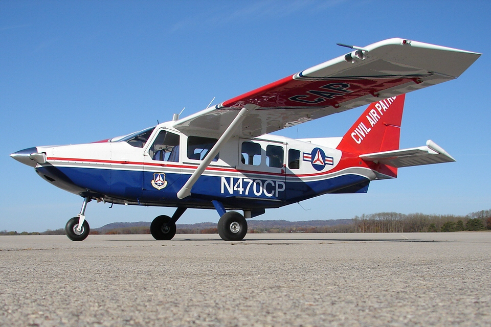 stalky bird...